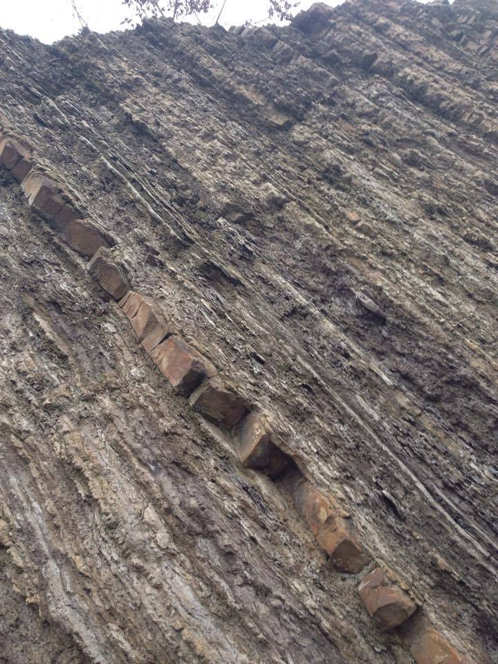 detail vrstiev skalného odkryvu